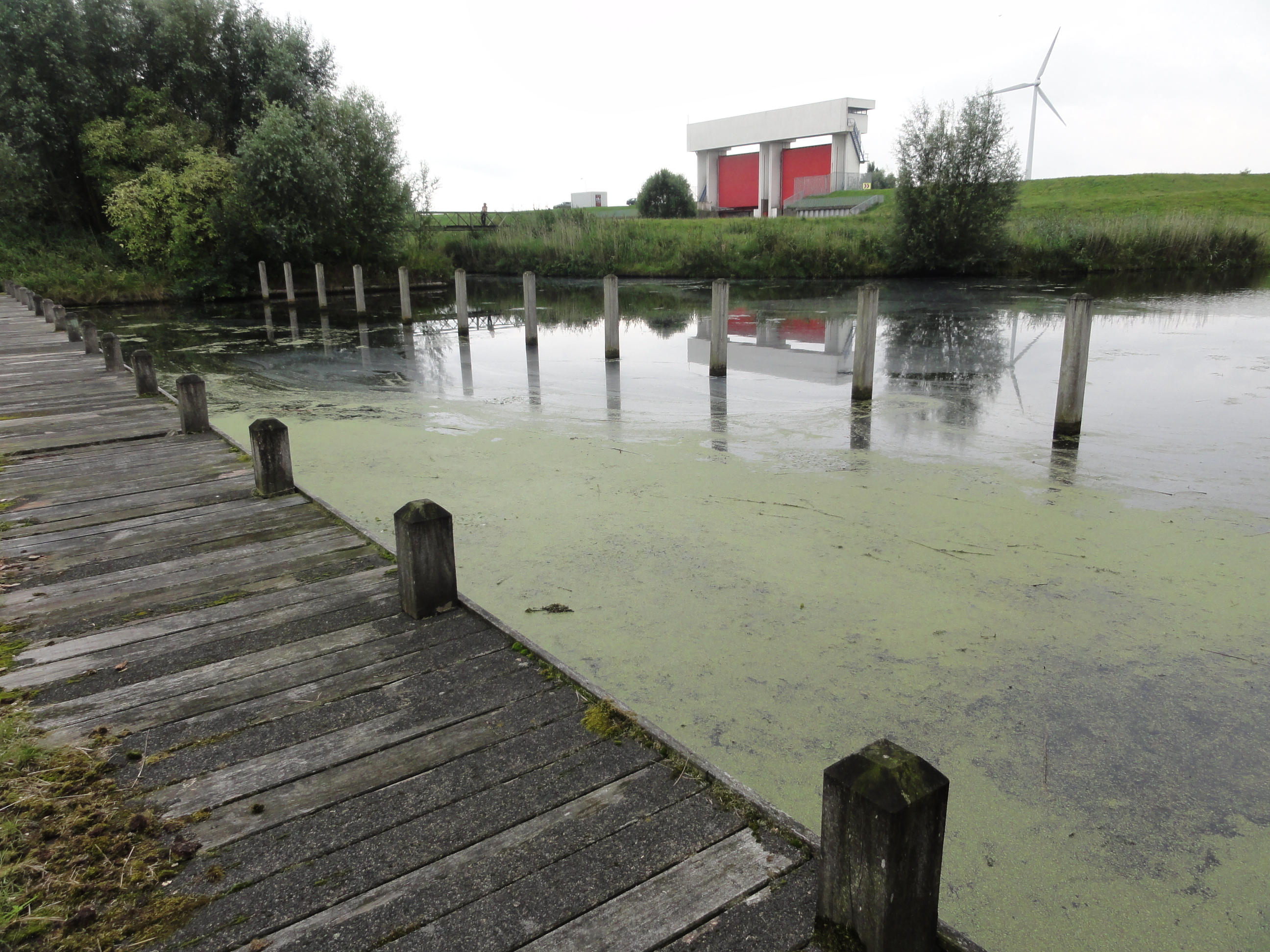 Passantensteiger de Peppelt bij de Hoge Knarsluis in de Flevolpolder